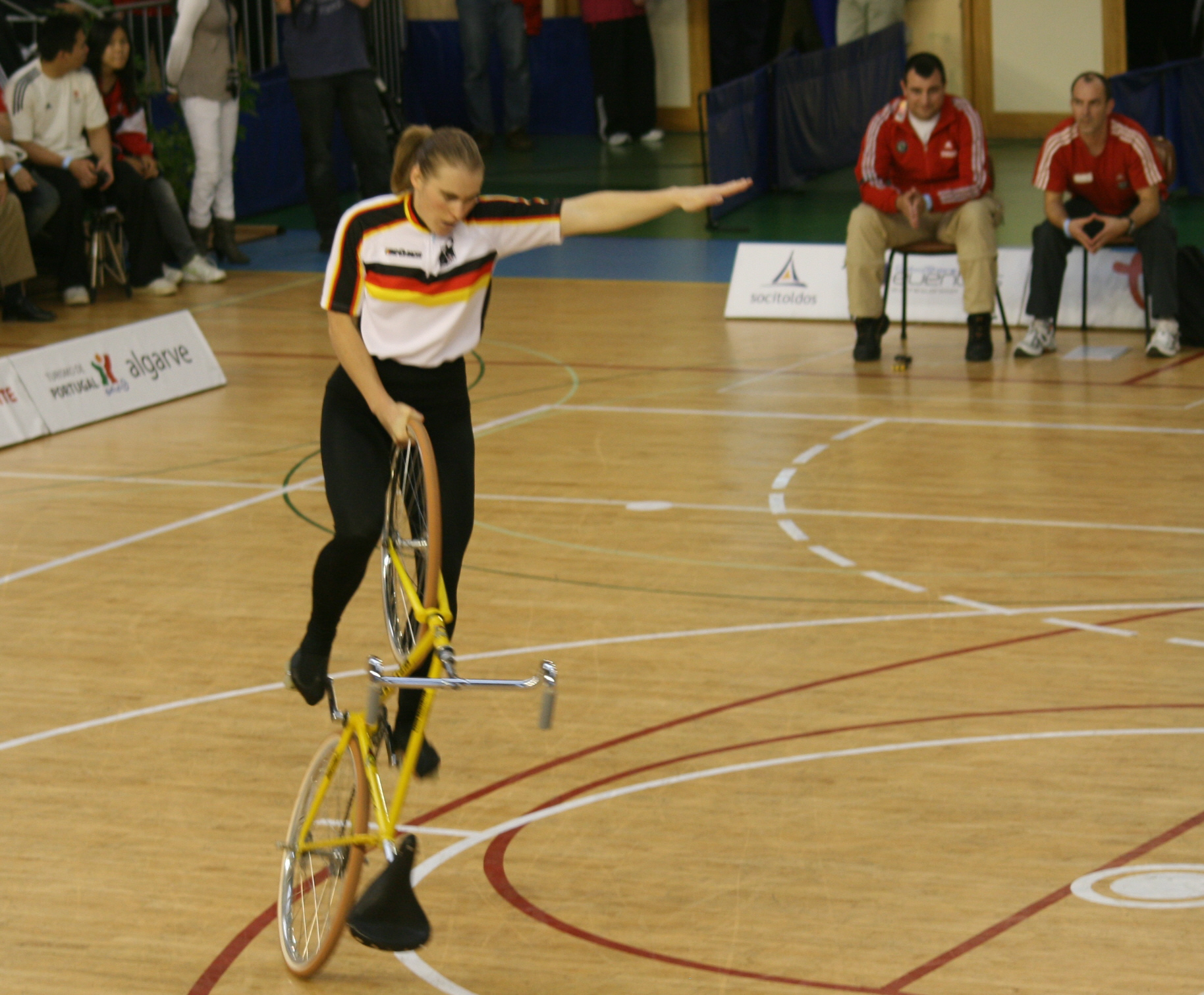 Corinna Hein bei der Weltmeisterschaft in Tavira, Portugal